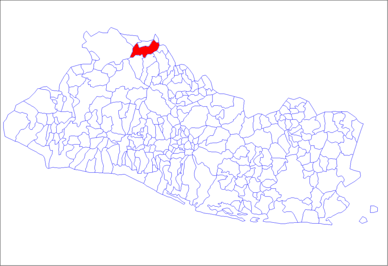 Map of El Salvador